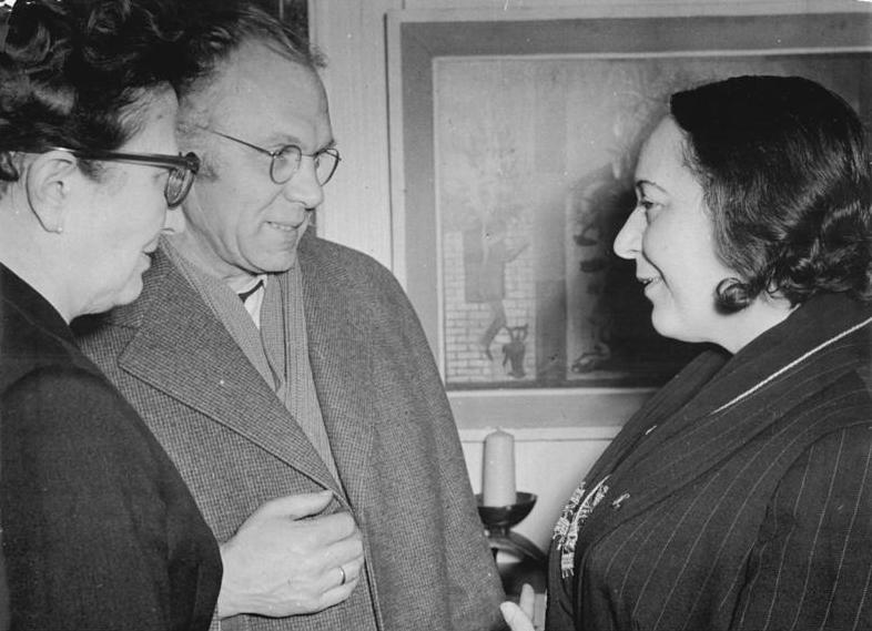 Zentralbild Ulmer 17.1.1959 25. Kunstausstellung der Deutschen Bücherstube Am 17.1.59 wurde in den Bäumen der Deutschen Bücherstube in Berlin, Friedrichstraße, die 25. Kunstausstellung unter dem Titel " Der unbekannte Hans Grundig " eröffnet. Die Ausstellung wird bis zum 14. Febriar d. Jahres geöffnet sein und Gemälde, Aquarelle und Zeichnungen des verstorbenen Künstlers zeigen. UBz: (V.l.n.r.) Frau Ilse von Kampt, Prof. Arno Mohr und Lea Grundig, die Gattin des verstorbenen Künstlers in der Ausstellung.